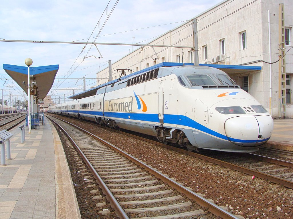 El Euromed S101-104 cubriendo el trayecto Barcelona - Valéncia en Tarragona